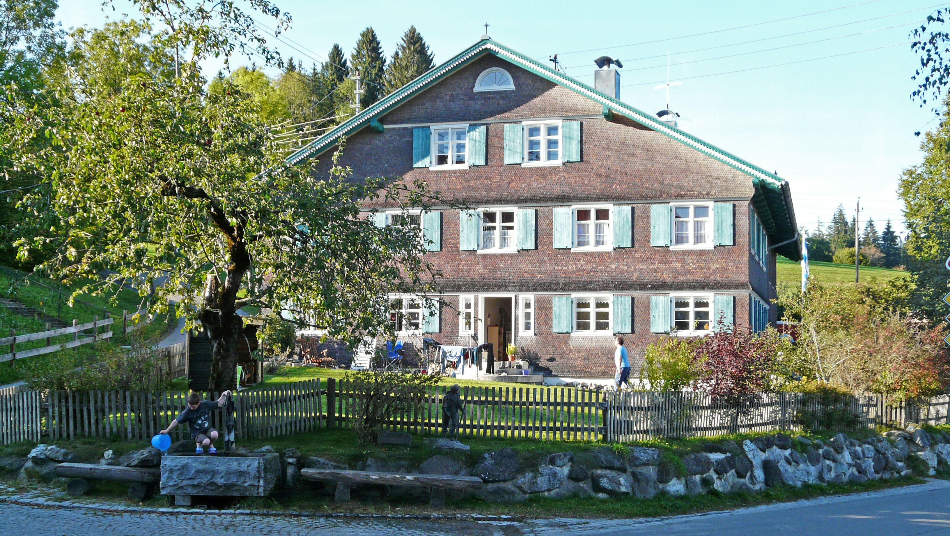 Pfarrhof in Knottenried, Immenstadt im Allgäu